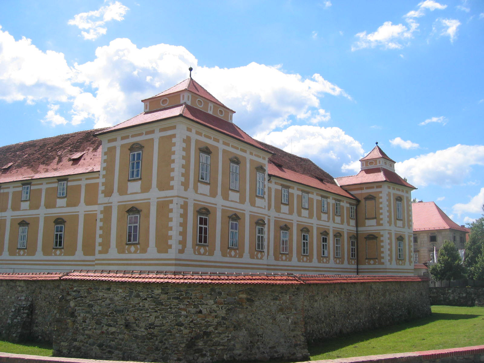 Slovenska bistrica castle, Slovenia